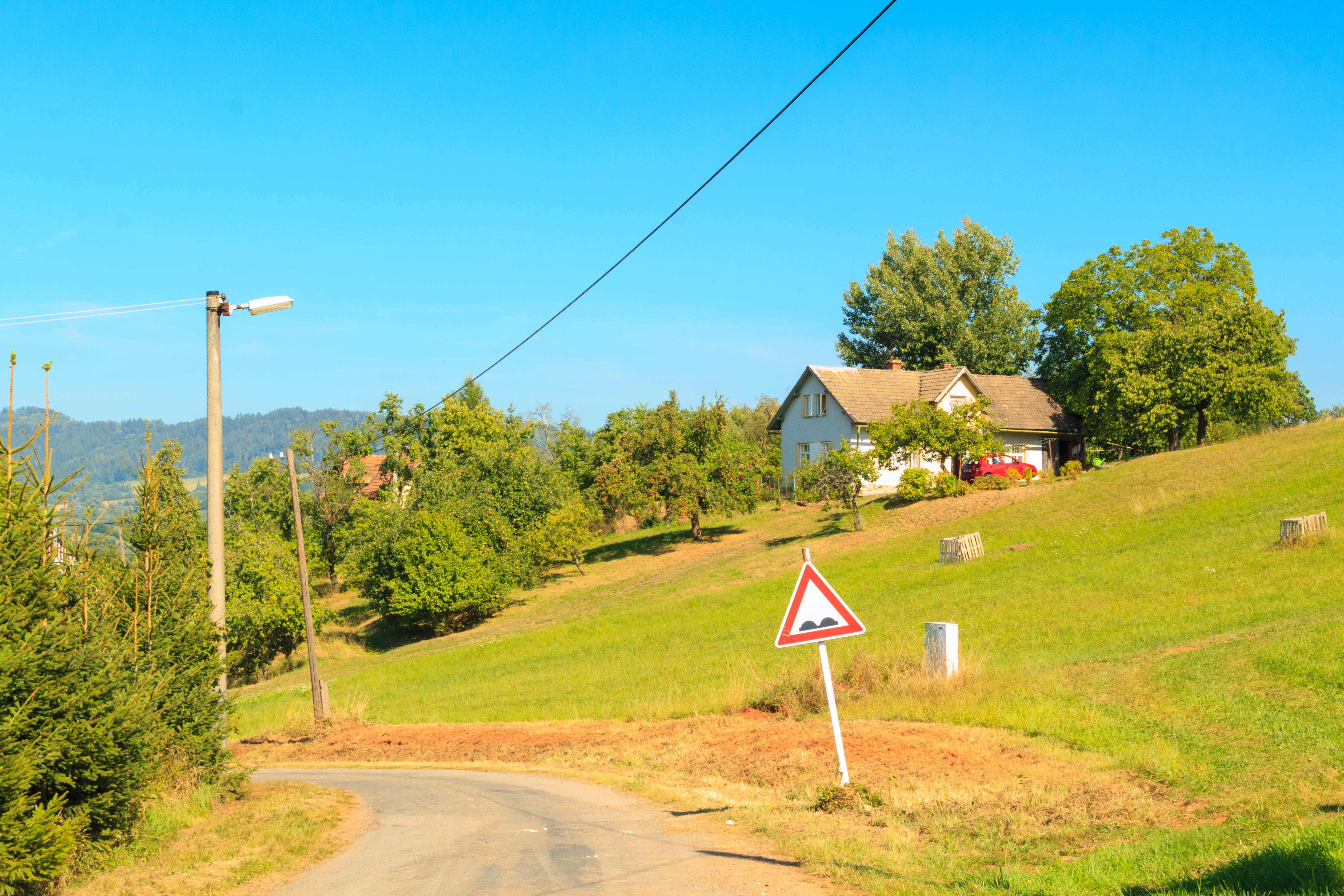 Křečovice 2. díl - čp. 29